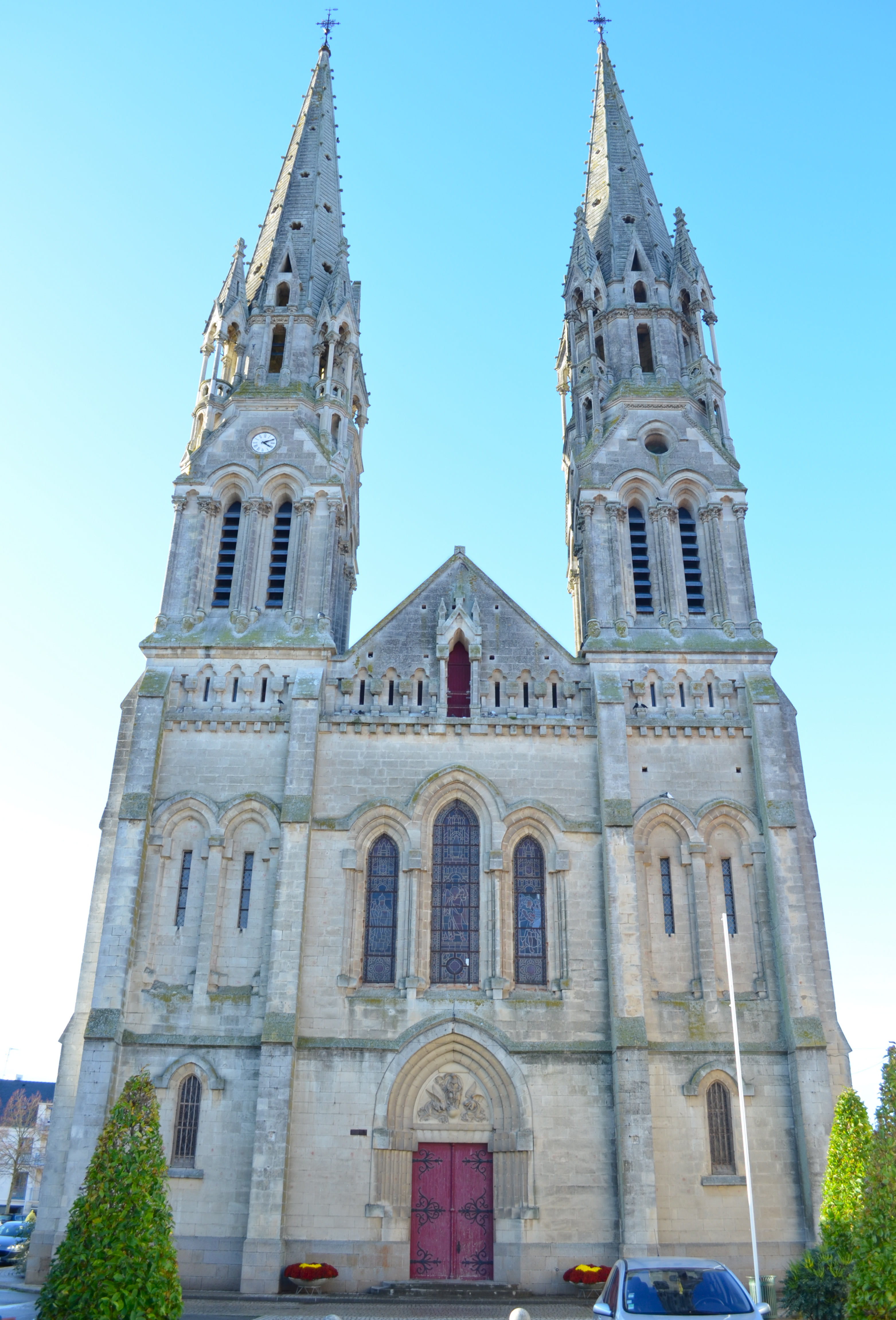 Clocher de l'église Saint Honoré - Machecoul (Loire-Atlantique)